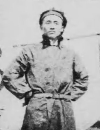 尾崎行輝 参議院議員（1期）。飛行機研究家。パイロット。